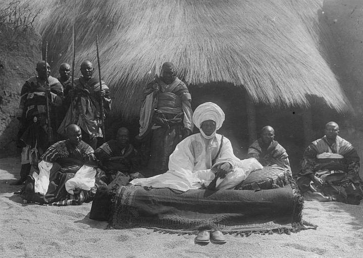 LAMIDO ISSA MAIGARI ABBO DE NGAOUNDERE 1904-1922 CETTE PHOTO DOIT ETRE PRISE VERS 1917 This is an image of Cultural Fashion or Adornment from Cameroon